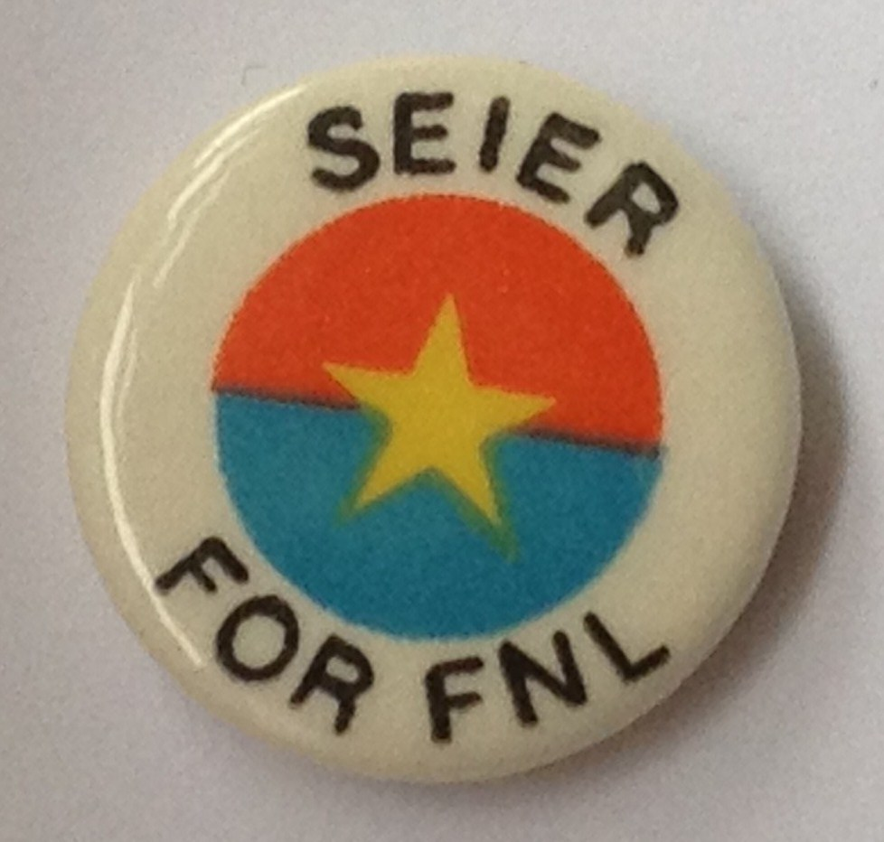 FNL-merke, distribuert i regi av Solkom.